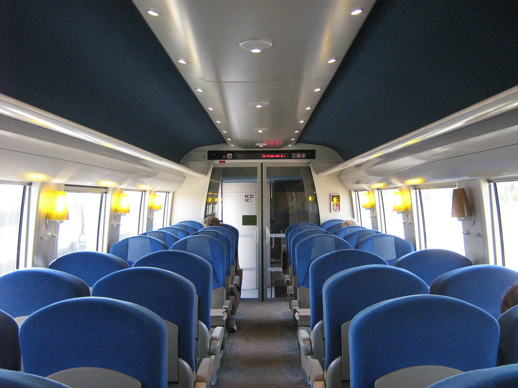 France Intérieur automotrice SNCF de type Z 21500